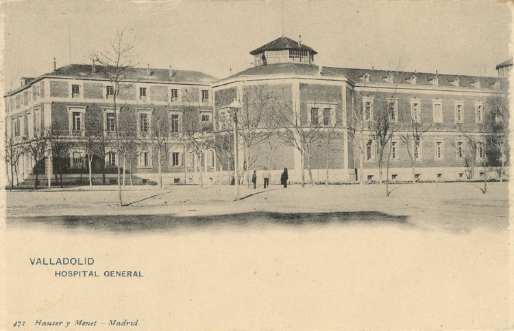 Hospìtal general - Valladolid - Unión Postal Universal. España - Tarjeta postal 140 x 90 B/N